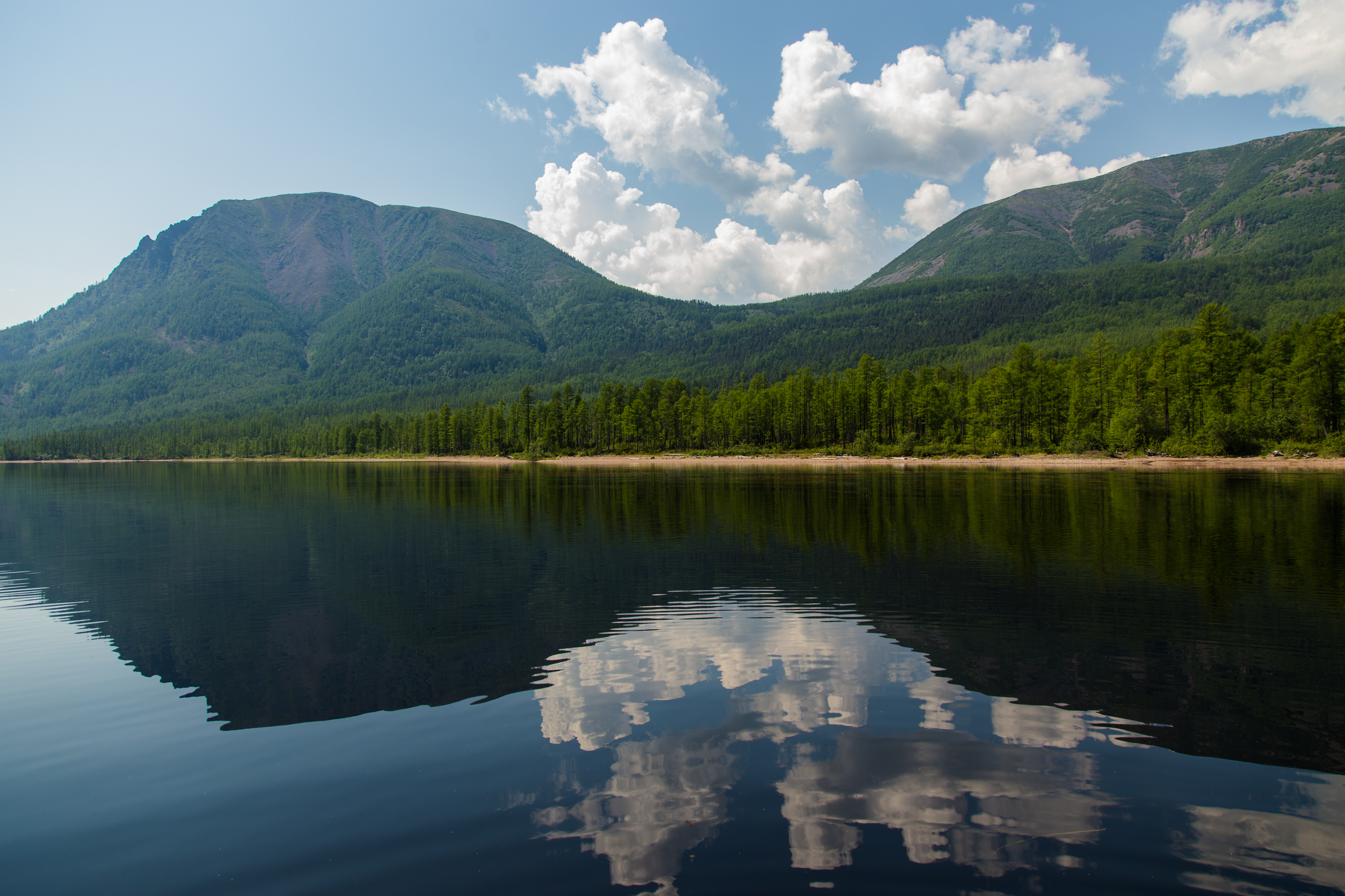 Озеро Большое Токко: Расположено в границах государственного природного заказника Большое Токко, Нерюнгринский район, Якутия (Саха) This image is related to the protected area of Russia number 1410141